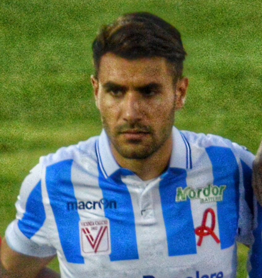 Formazione iniziale del Vicenza nel 1° Trofeo Morosini